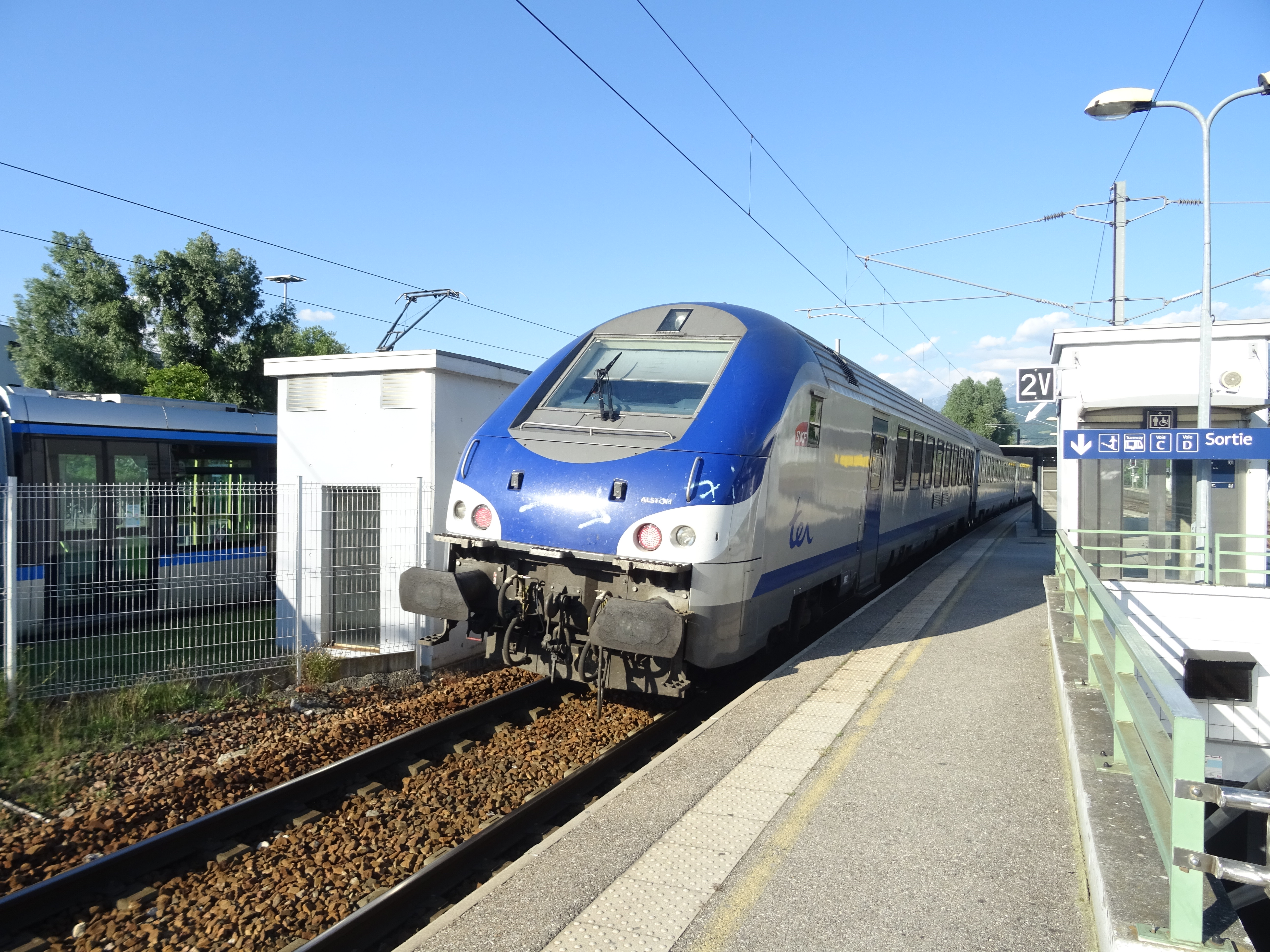 Voiture-pilote en queue d'un TER Rhône-Alpes quittant Grenoble-Universités-Gières en direction d'Annecy.